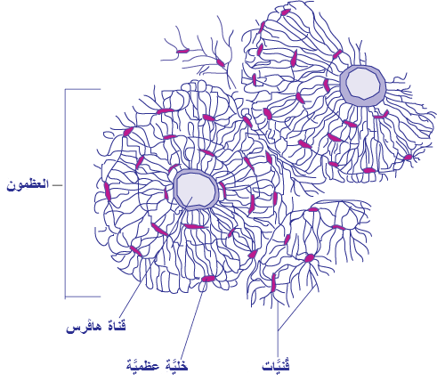 رسمٌ بيانيّ يُصوِّرُ المقطع العرضي لِلعظم (مع إزالة الكلسيوم)، بعد تكبير الصُورة بِمائتين وخمسين (250) مرَّة.